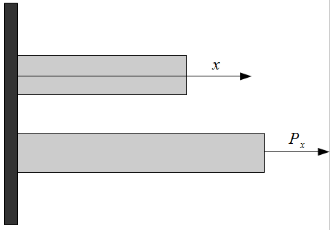 Liniowe wydłużenie pręta pod działaniem naprężenia